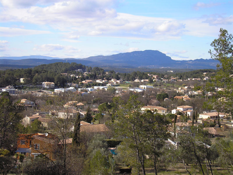 Urbanisation récente à Prades-le-Lez : Est du village